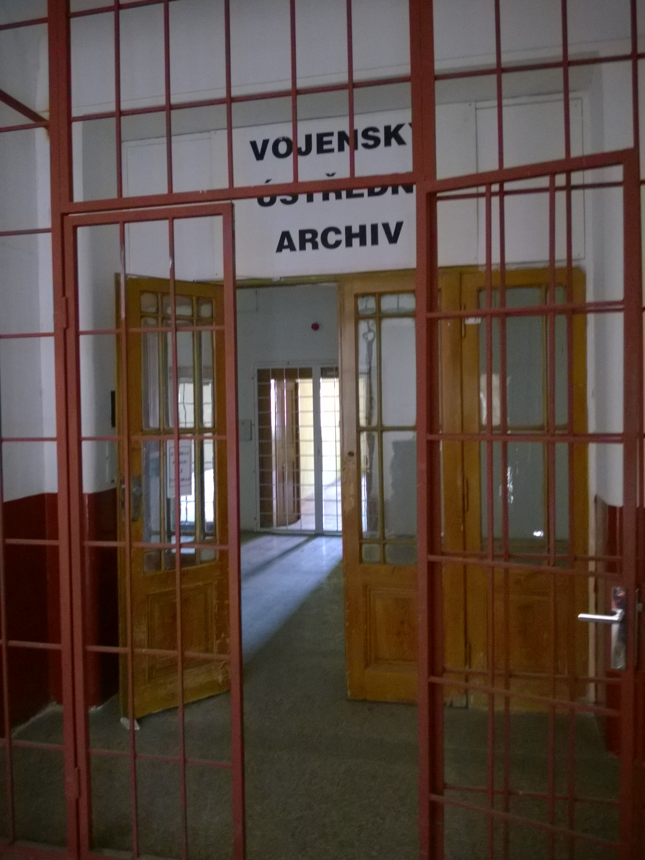 Praha - Ivaldiovna, prostory dříve užívané VÚA, druhé patro